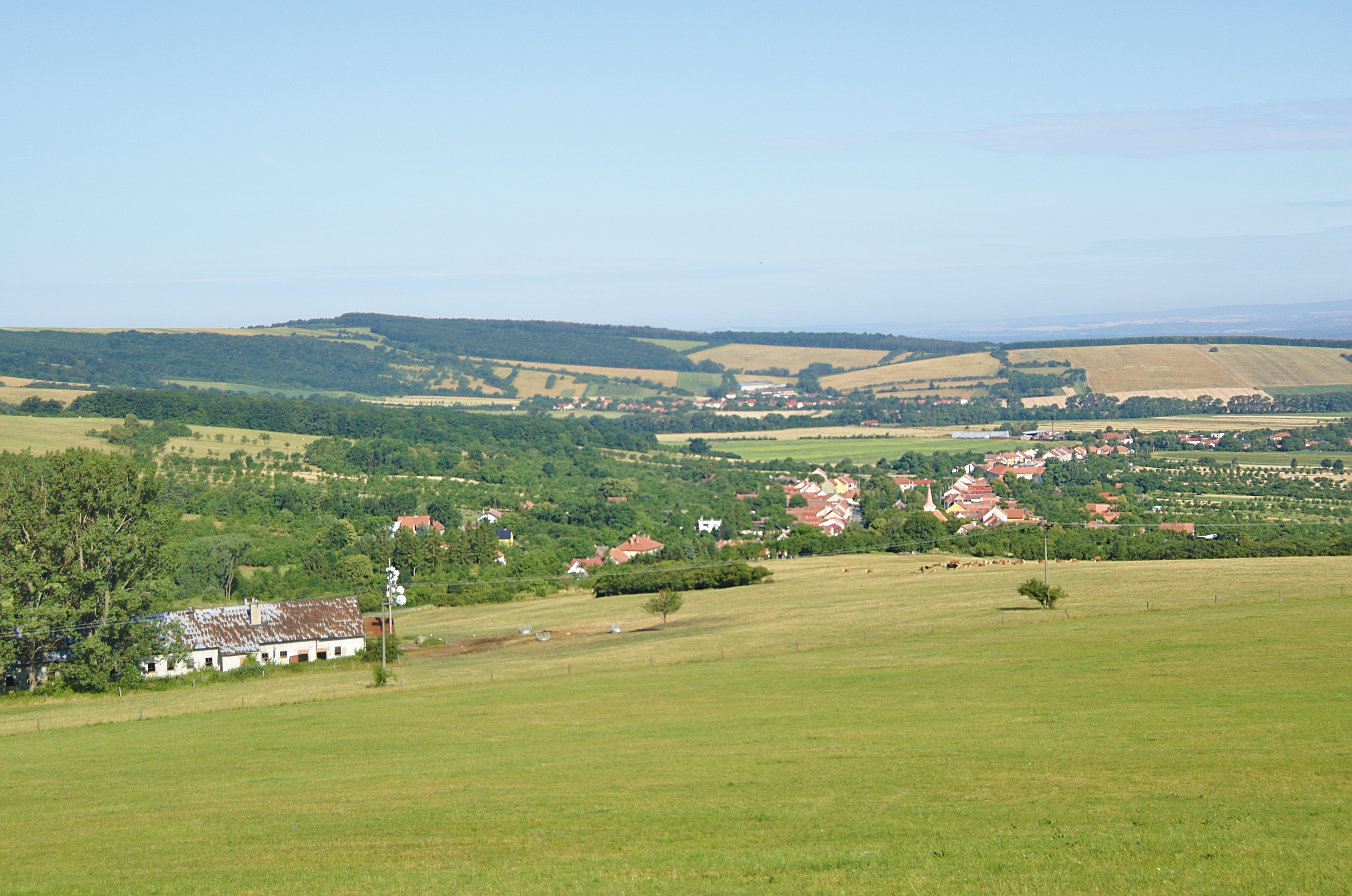 Pohled na obec od jihu, Kuželov, okres Hodonín